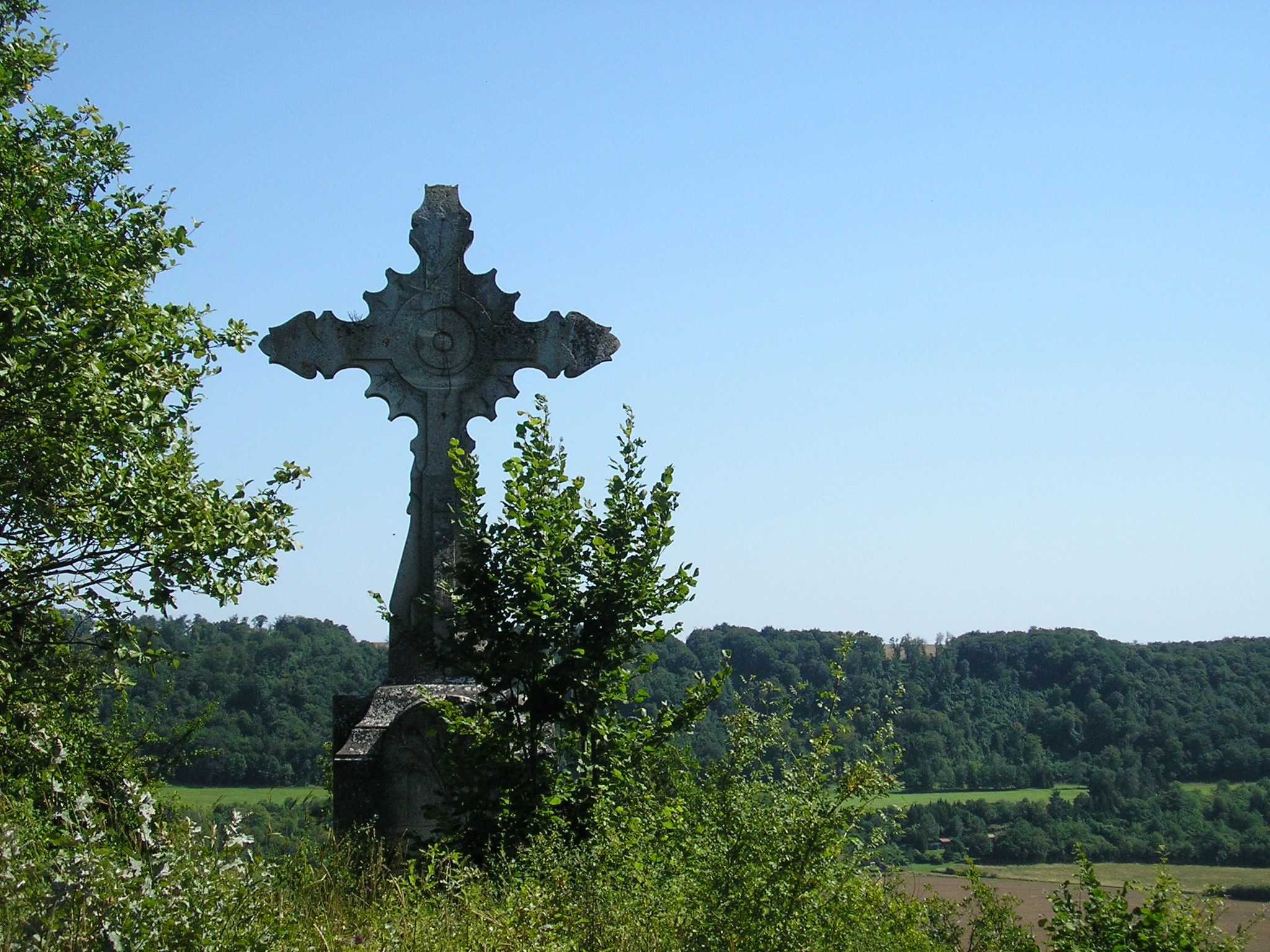 Waville : La Croix de Joyeuse